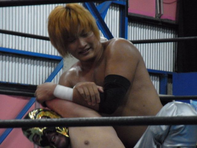 KAIENTAI-DOJOのプロレスラー滝澤大志